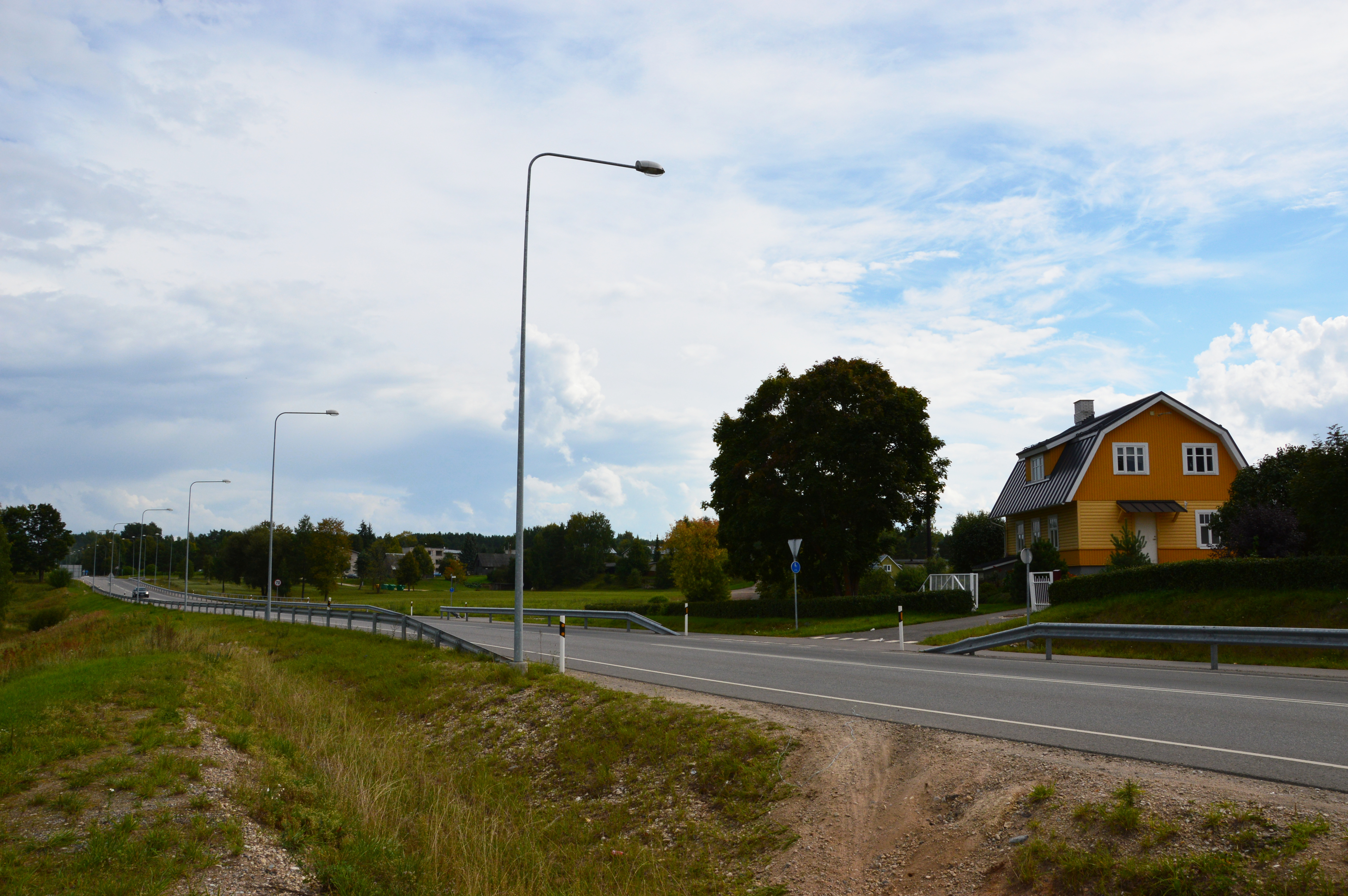 Võru–Verijärve maantee Kose alevikus.